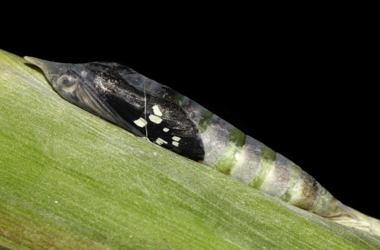 GRASS DEMON Udaspes folus just before emergence